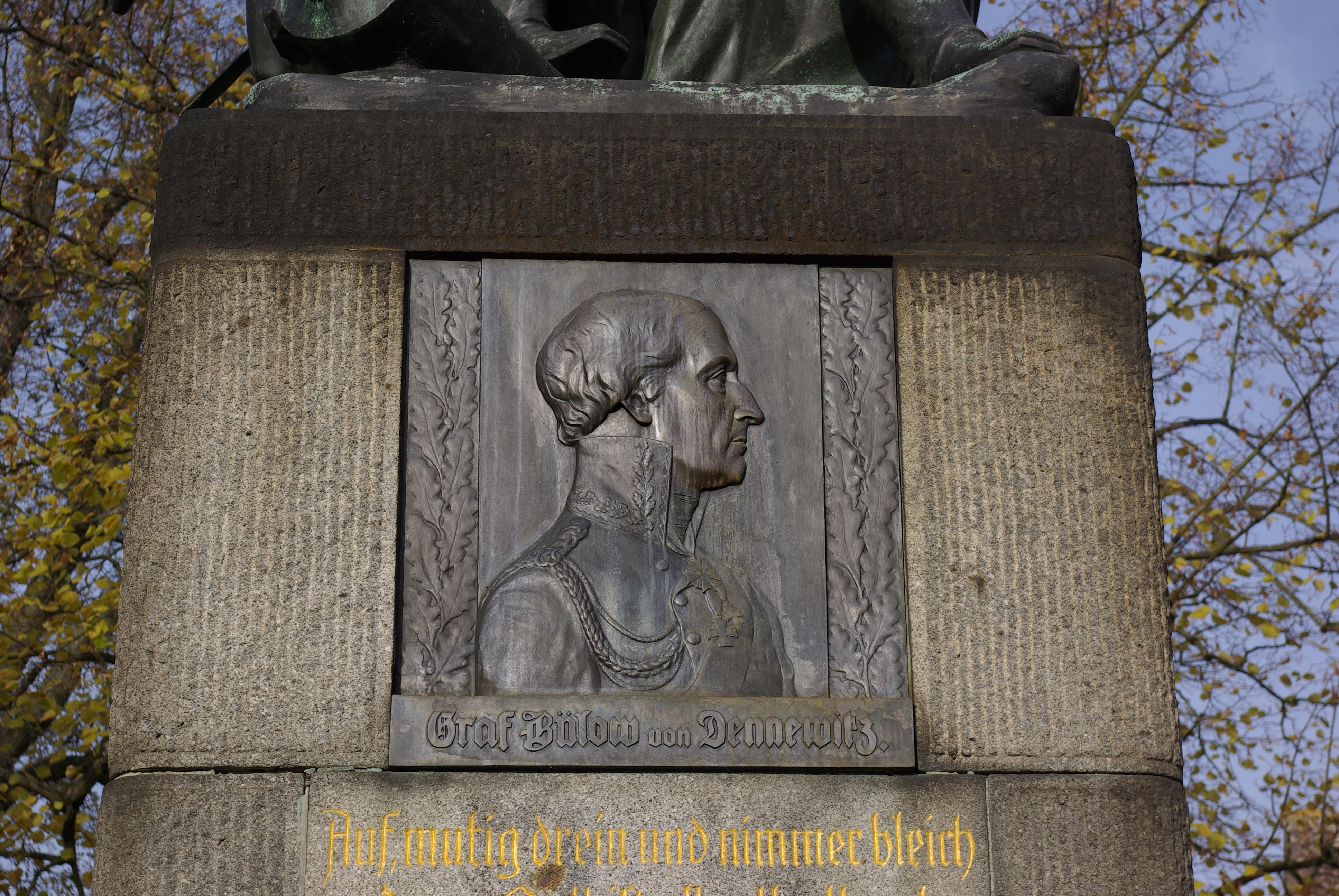 Niedergörsdorf in Brandenburg. Das Bülowdenkmals erinnert an die Schlacht bei Dennewitz. Das Bild zeigt das Bild von Bülow an der Frontseite des Denkmals.